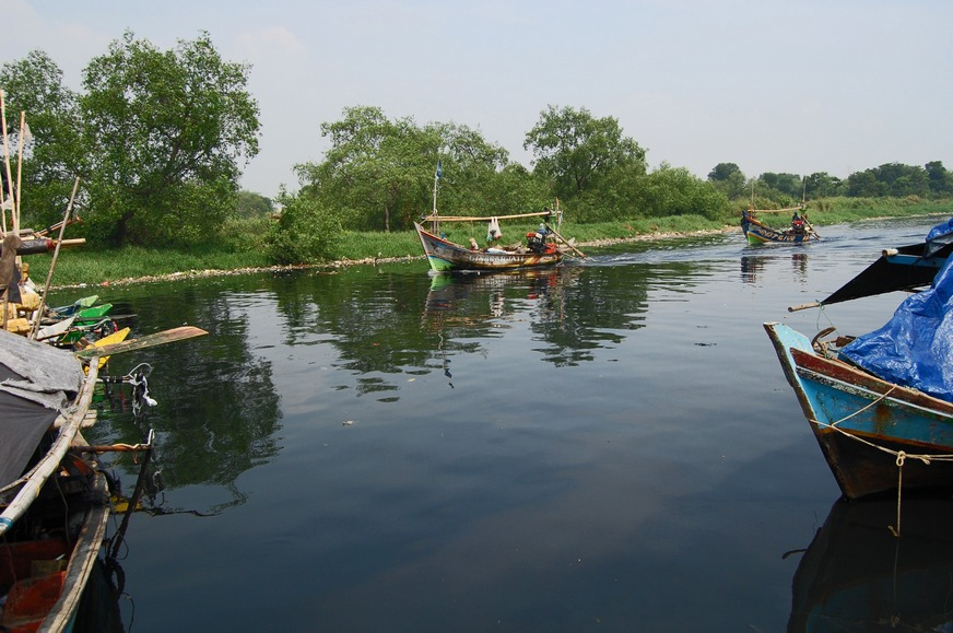 Angke river, Jakarta, Indonesia